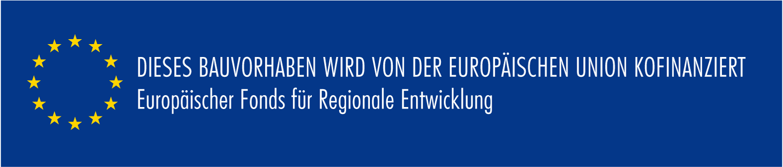 EU-Hilfs-Plakat auf Ewald